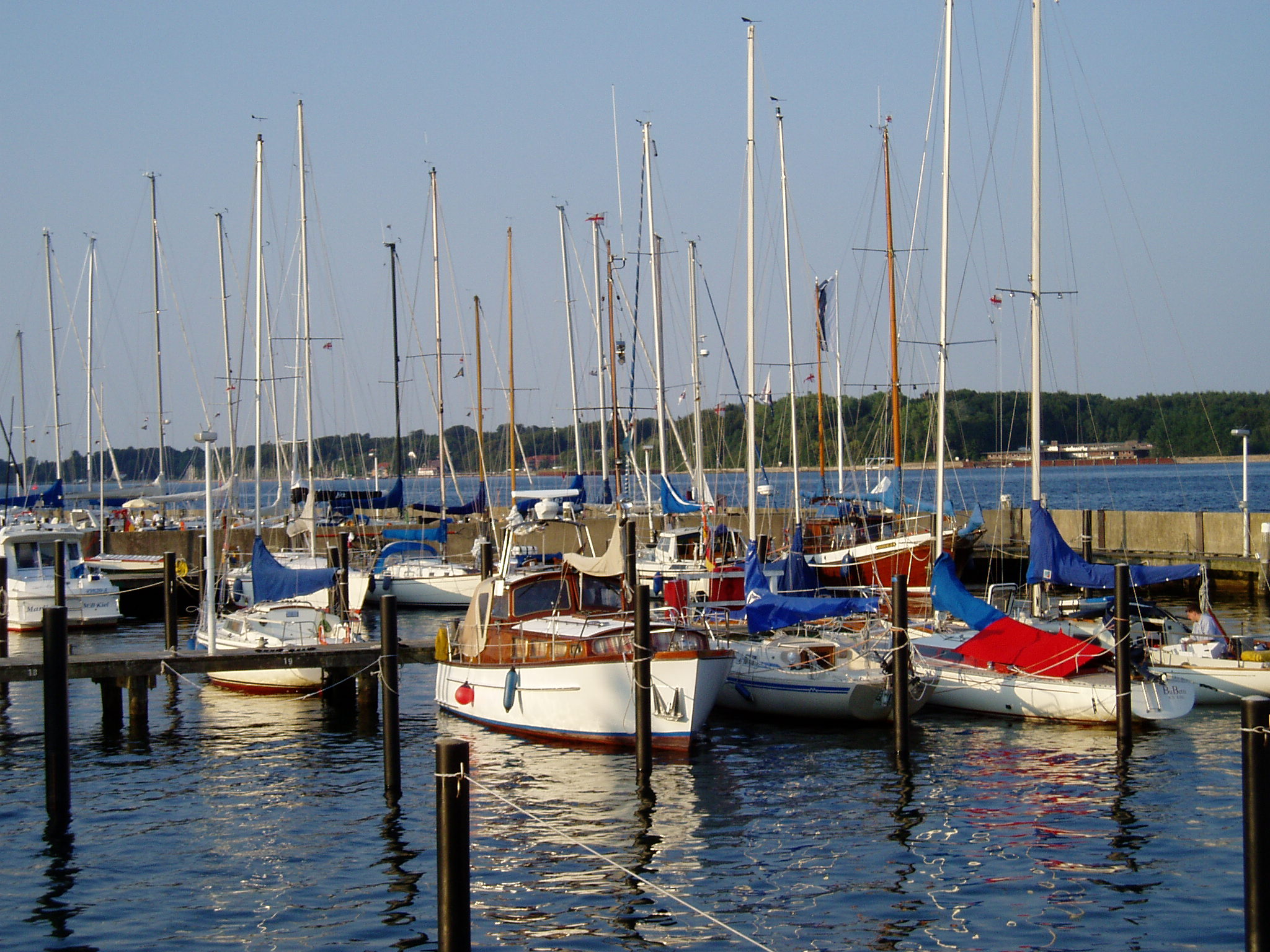 Kiel-Düsternbrook, Segelschiffe im alten Olympiahafen Kiel